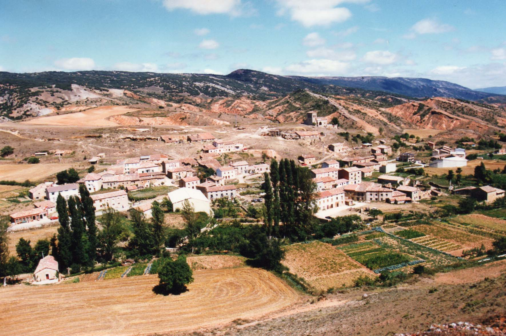 Panorámica del pueblo de Abajas